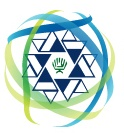 Logo de l'Organisation sioniste mondiale